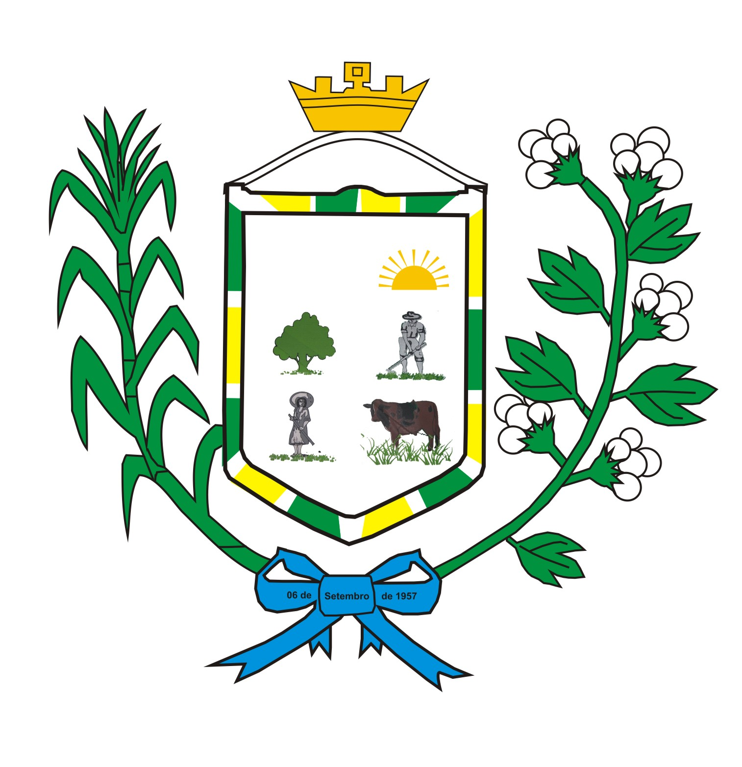 Brasão do Município de Belém da Paraíba